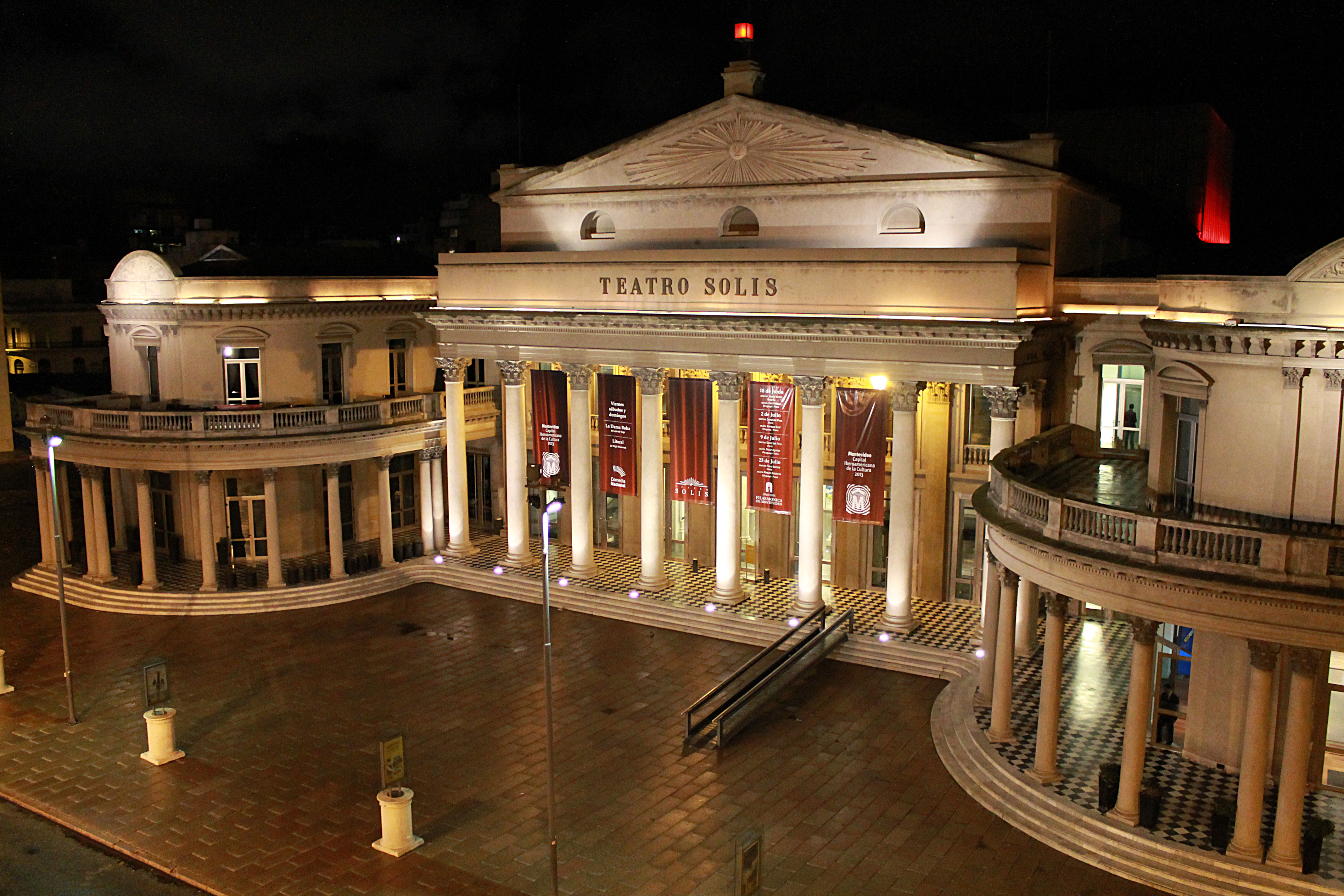 Teatro Solís. Ubicada en el departamento de Montevideo